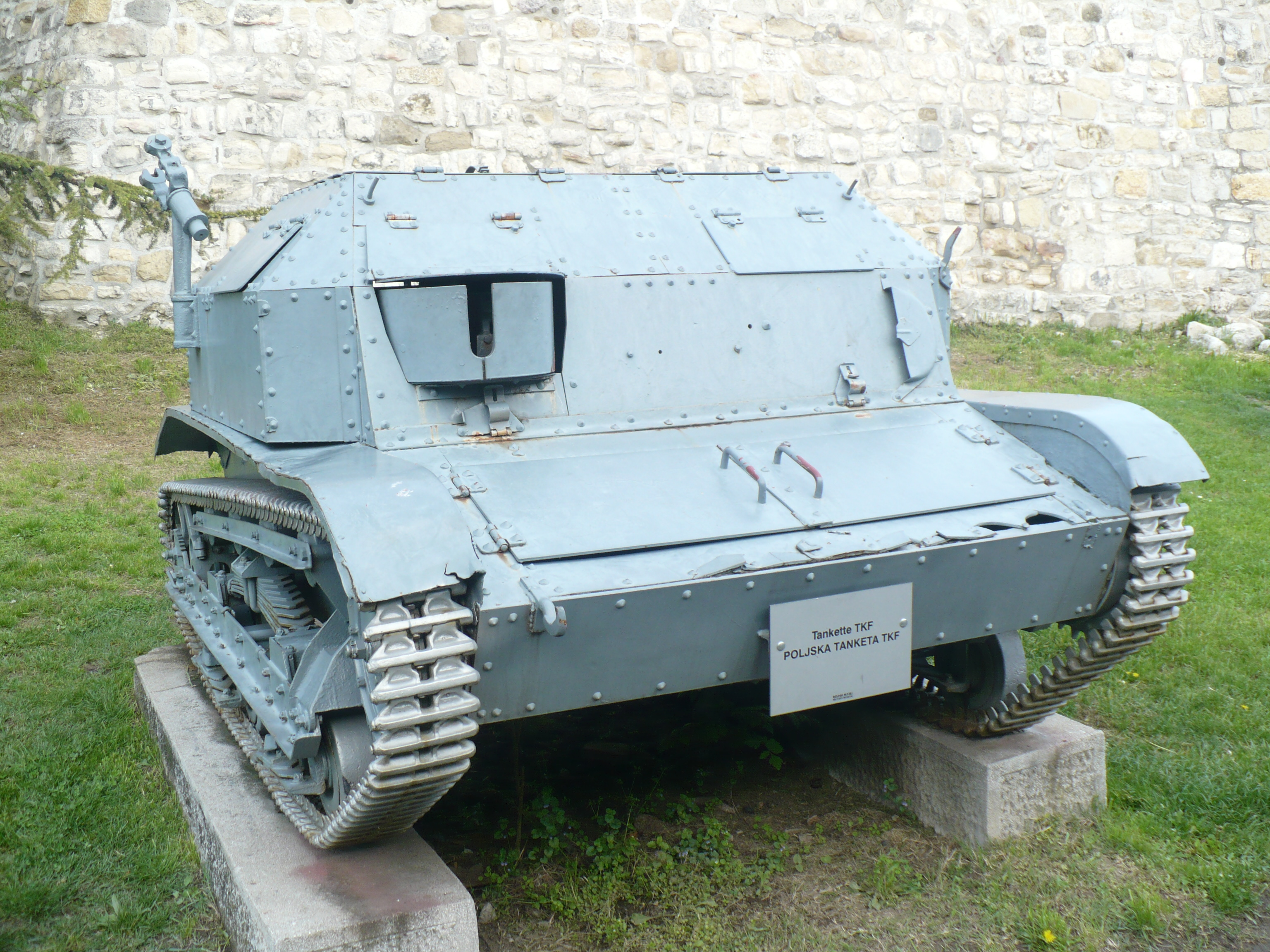 Tankette TKF